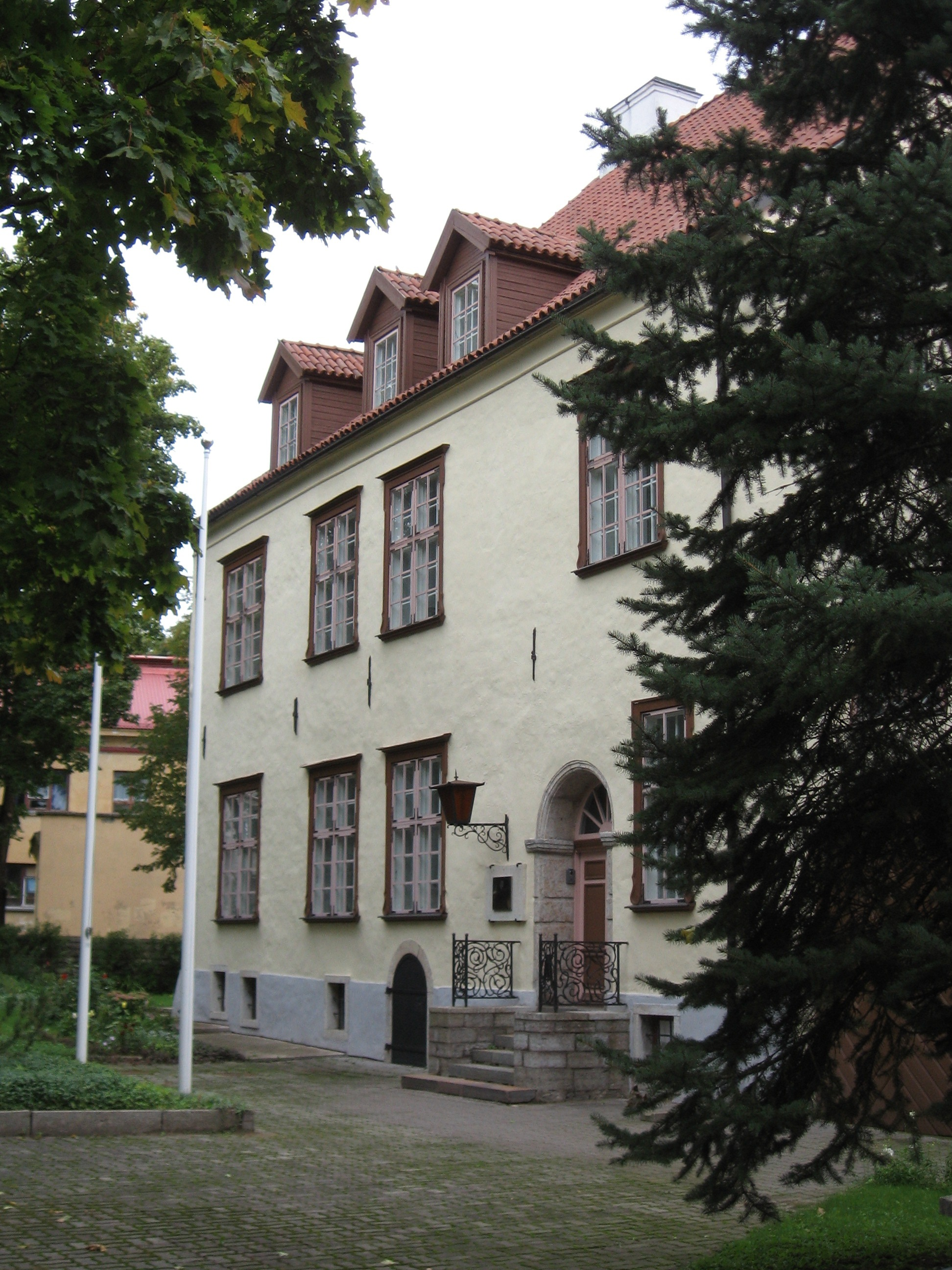 Elamu Narvas Koidula tn 3a